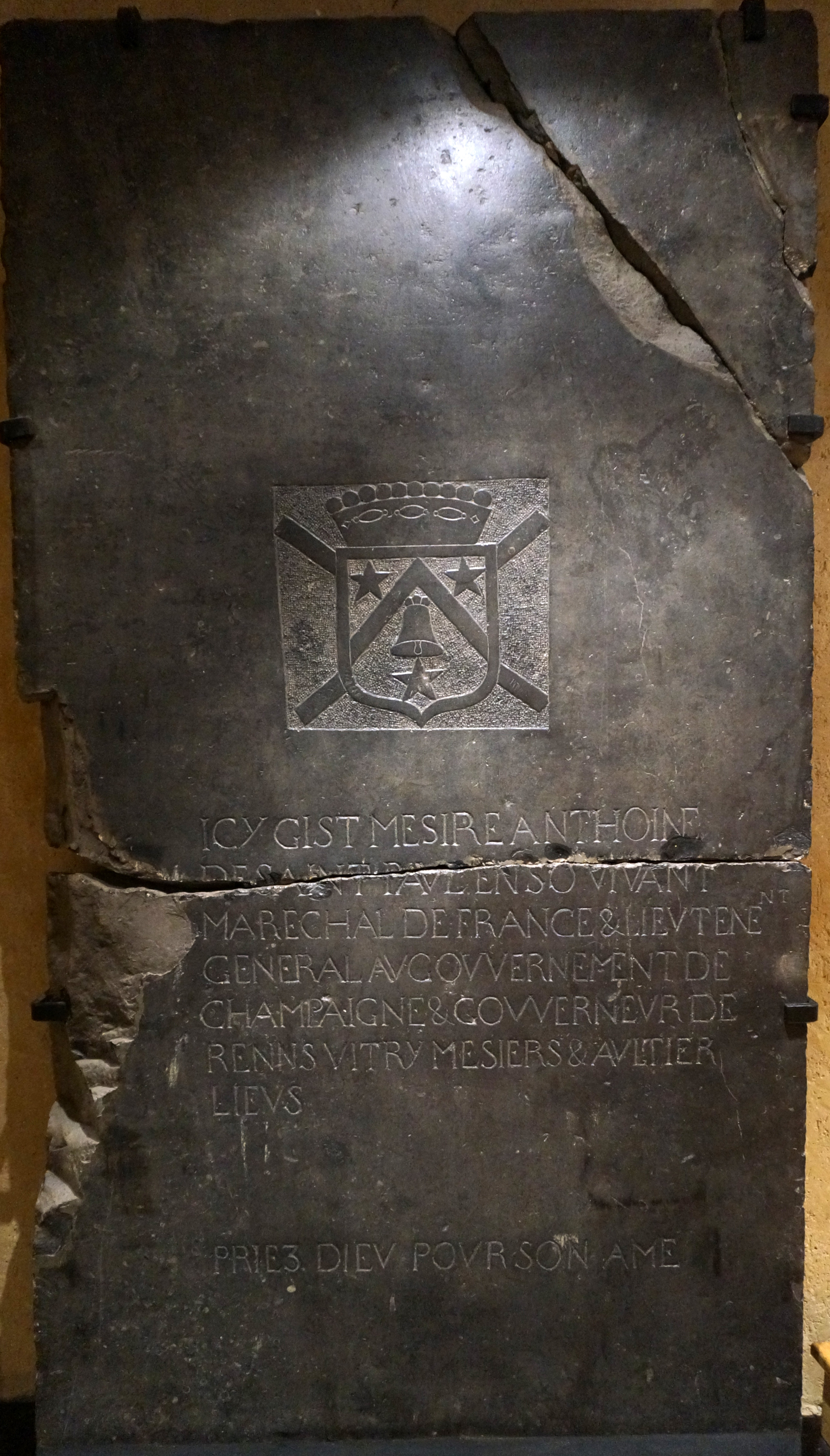 Dalle du maréchal de saint-paul, Épouse Jeanne de Pradines il est seigneur de Danneron, Bussy, Houry, Chercotte, Bourlandin . En 1583 Lieutenant général de Reims, mestre de camp du régiment de Champagne en 1586/1587 présent à la bataille d'Auneau .